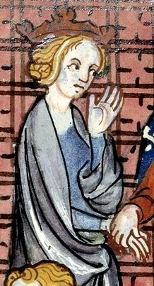 Margareta, kraljica Engleske, Ugarske i Hrvatske, sa svojim bratom Filipom II.